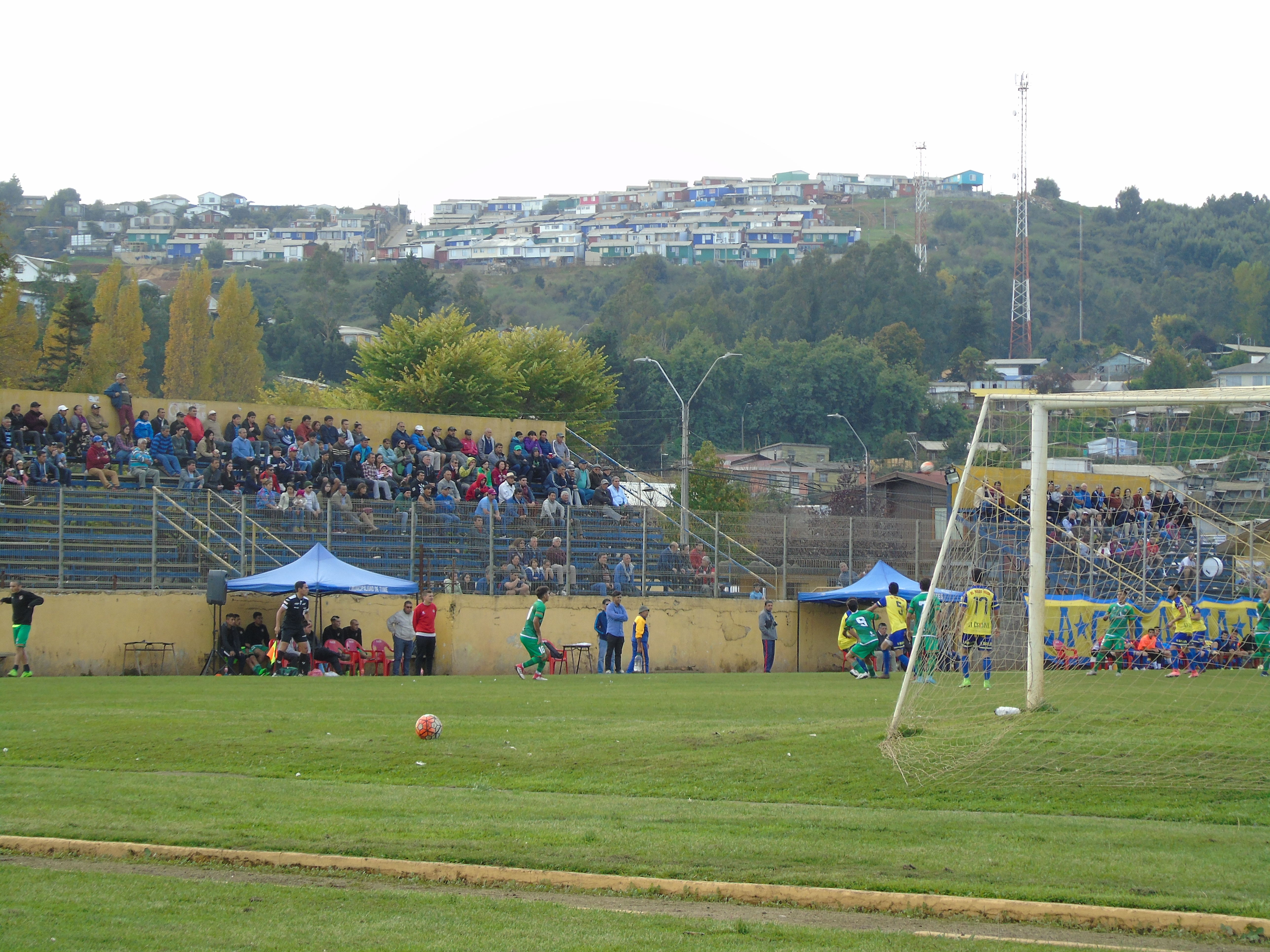 Fotografia de las Galerias de calle Egaña, en la Imagen Hincha de Club Deportes Tomé en un partido por Tercera B frente a Chimbarongo FC en el año 2018